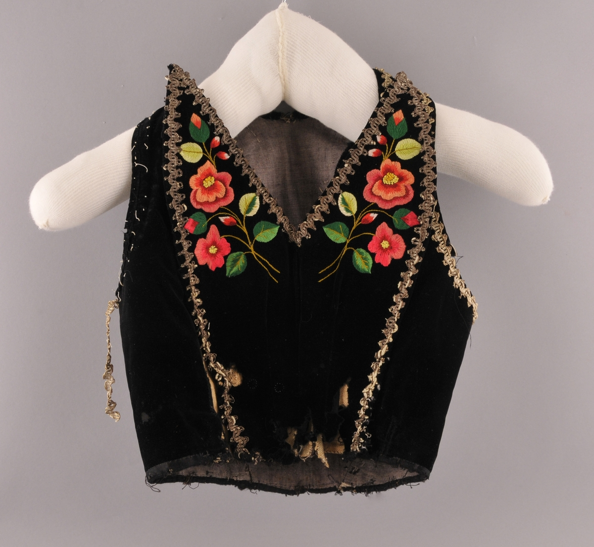 Liv av Vest-Telemarkbunad med fløyelsliv.